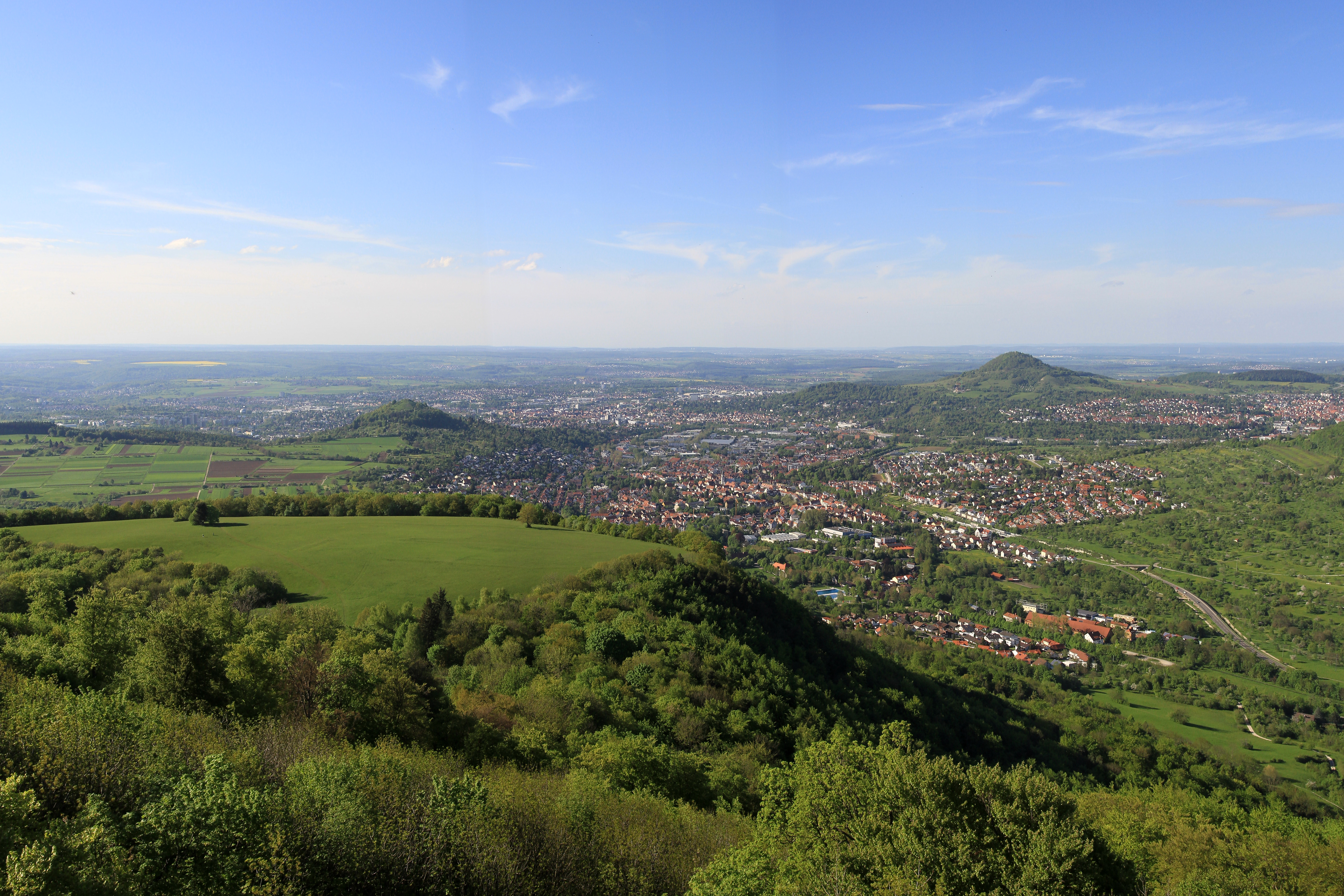 Panoramablick über Pfullingen und Reutlingen, hinten, vom Schönbergturm aufgenommen. Der Kegel links, Georgenberg, ist ein ehemaliger Schwäbischer Vulkan.